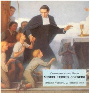 imagen de Febres Cordero